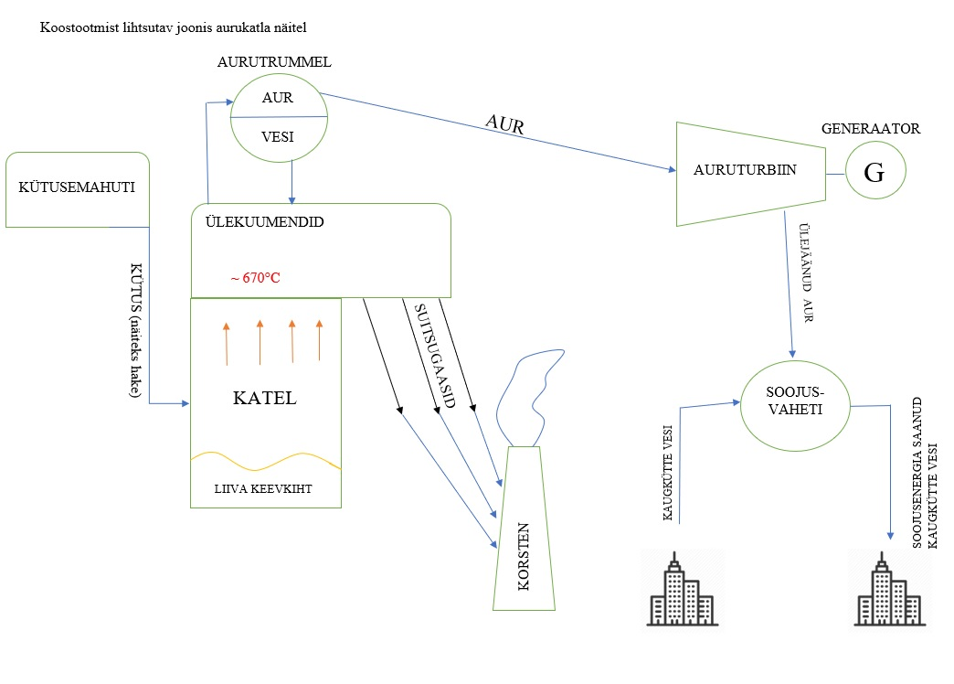 Lihtsustav joonis